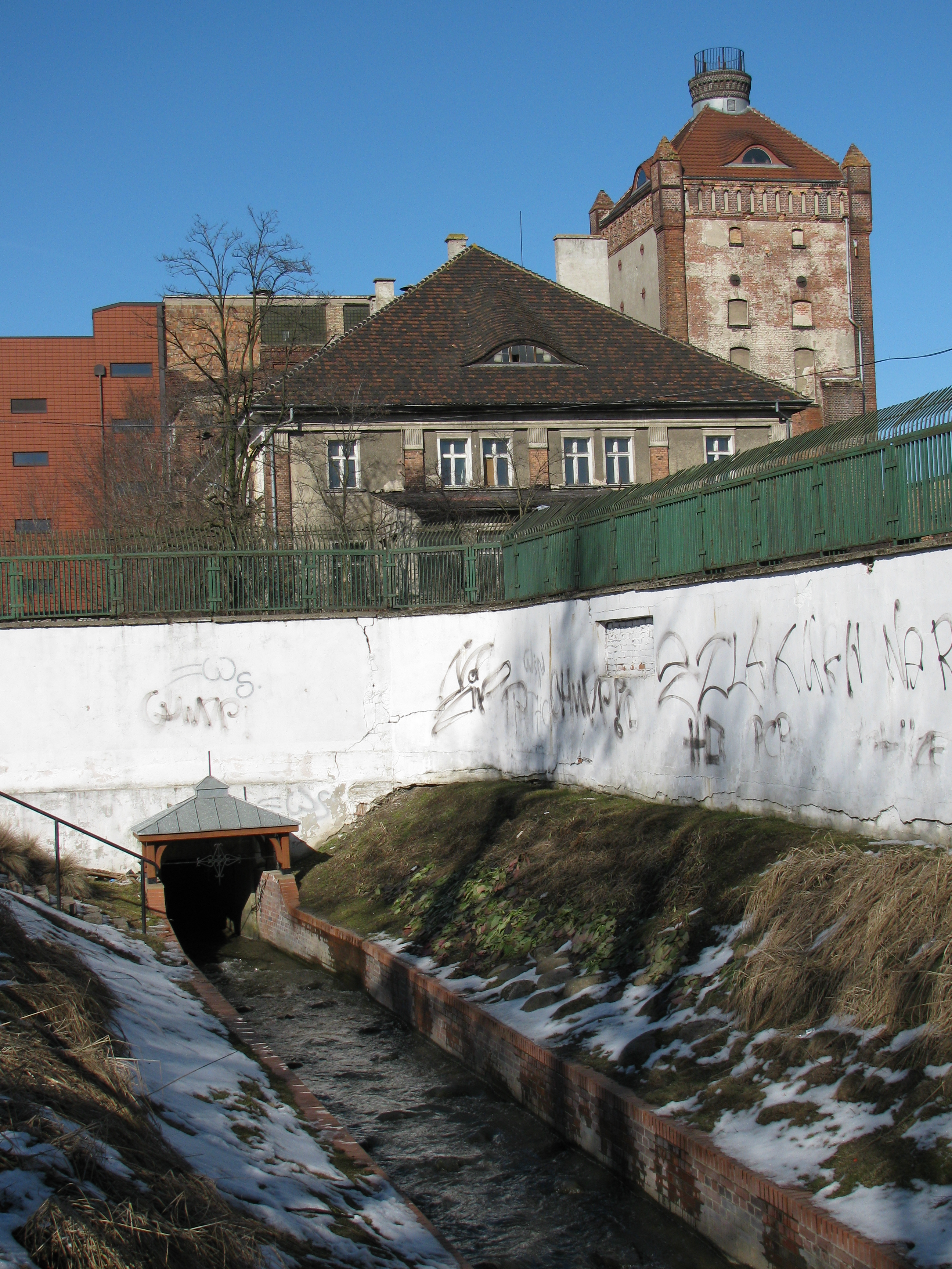 Browar we Wrzeszczu i struga Strzyża w parku Kuźniczki (po wypłynięciu z browaru). W środku willa dyrektora browaru (z 1914 r.), po prawej magazyn.